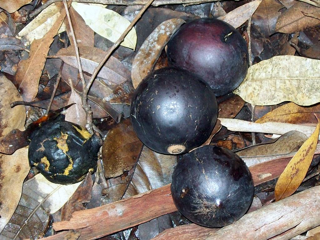 Endiandra globosa fruit, approximately 3 to 6 cm in diameter